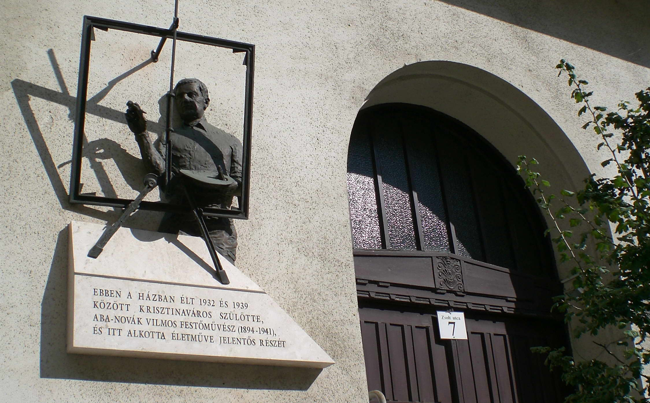 Aba-Novak home, Vilmos Aba Novák